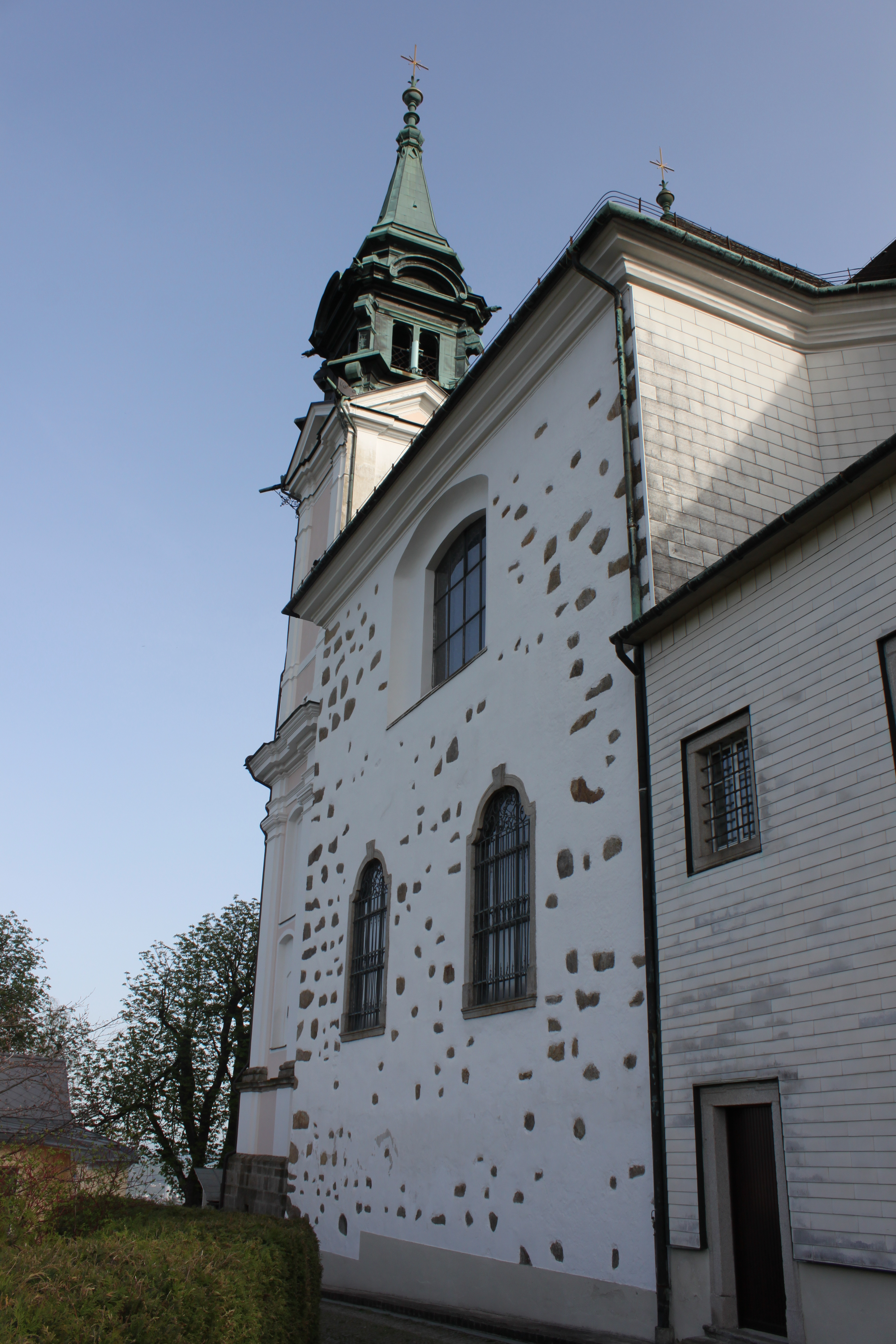 Basilika Pöstlingberg Sieben Schmerzen Mariä